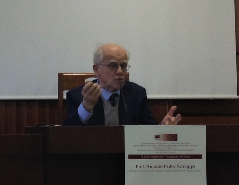 Il prof. Schioppa presso l'Università "Magna Graecia" di Catanzaro tiene una lectio magistralis